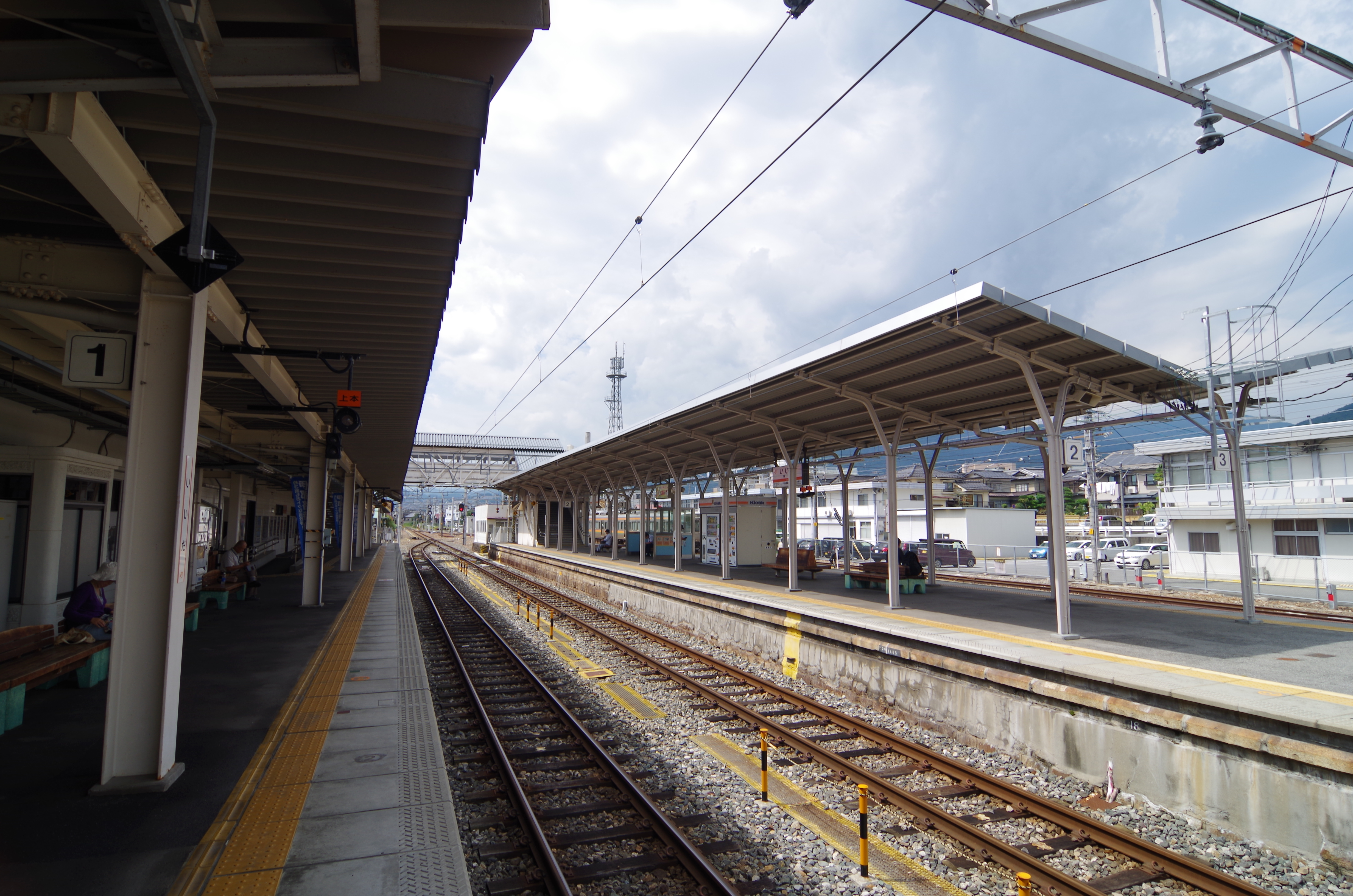 JR飯田線 飯田駅 2014.9.10